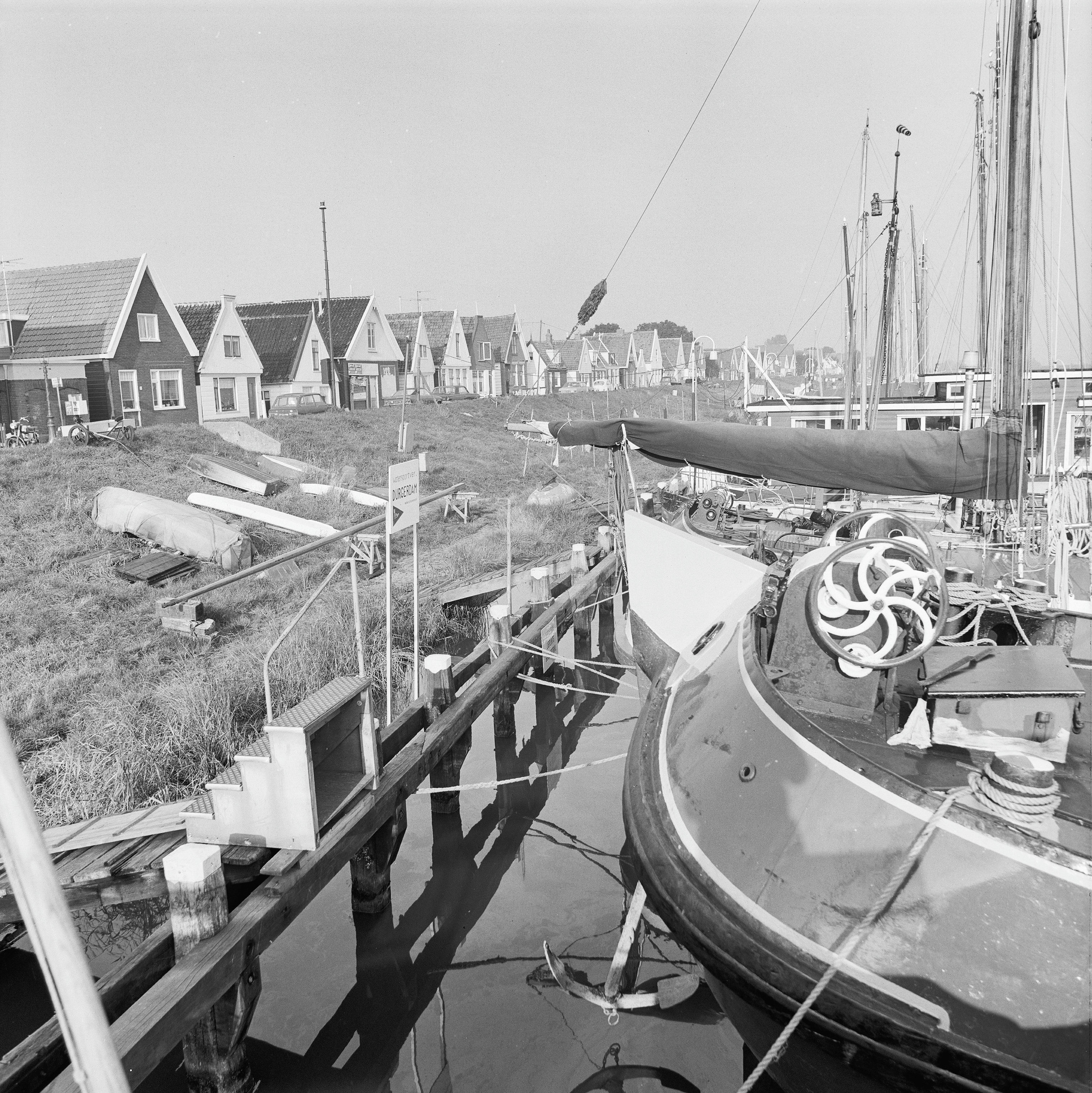 Overzicht: overzicht naar Durgerdammerdijk